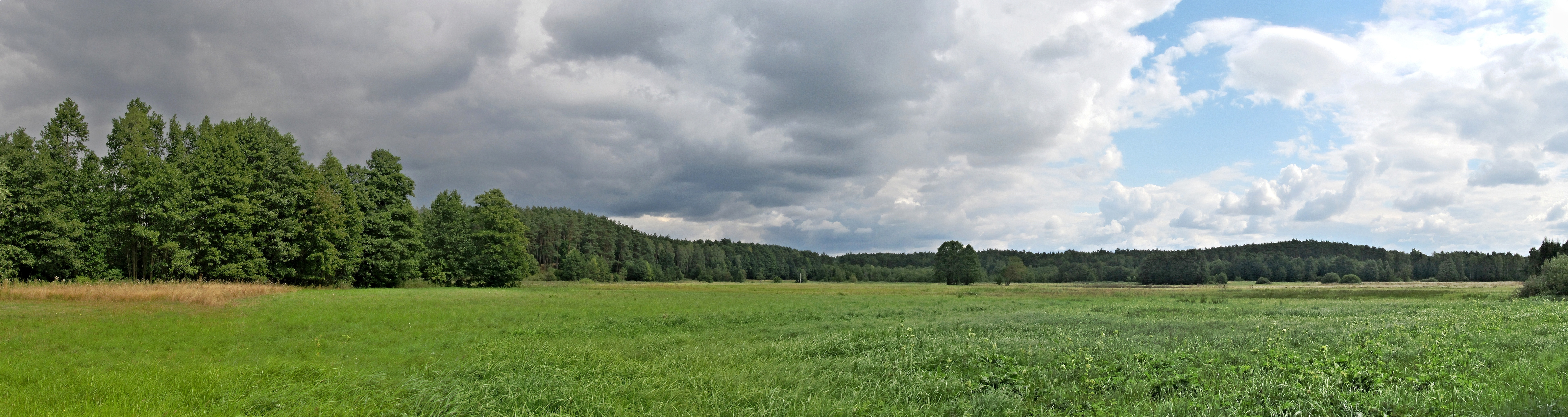 Osowo Leśne położone jest w gminie Lubichowo na Kociewiu.